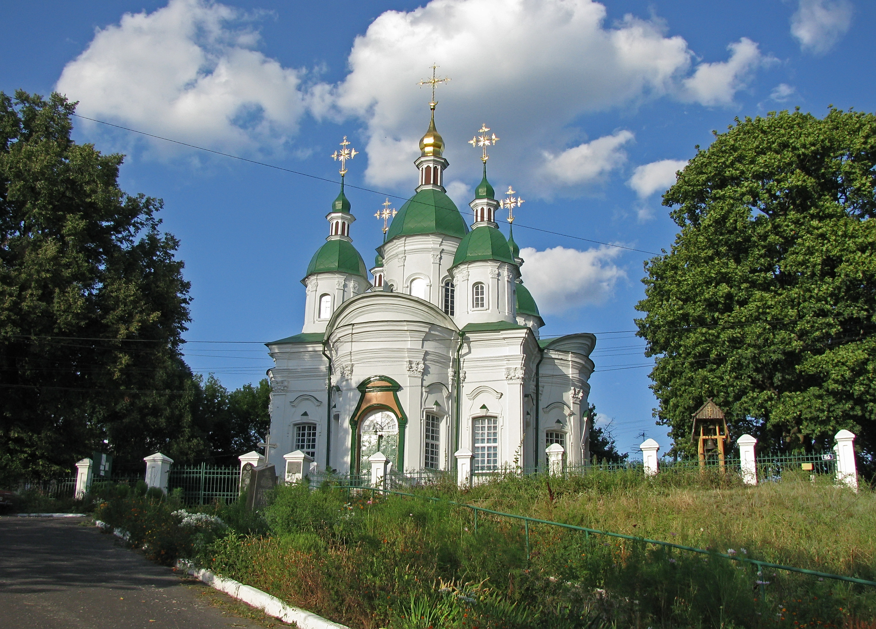 Собор Антонія та Феодосія (мур.), Васильків, вул. Соборна, 61